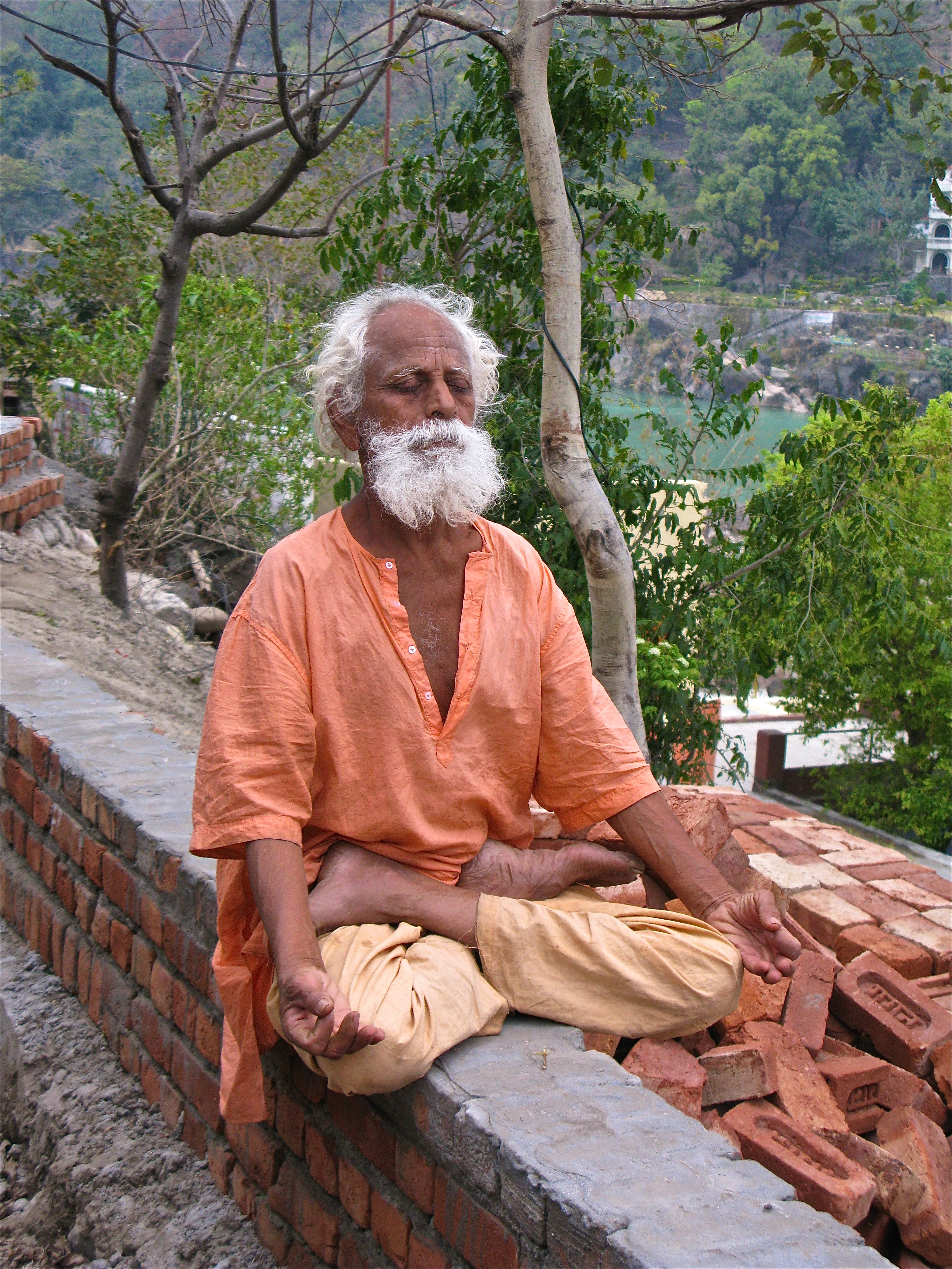 Sannyasa, Sadhu, Bhikshu, Yati, Samnyasa, Meditation